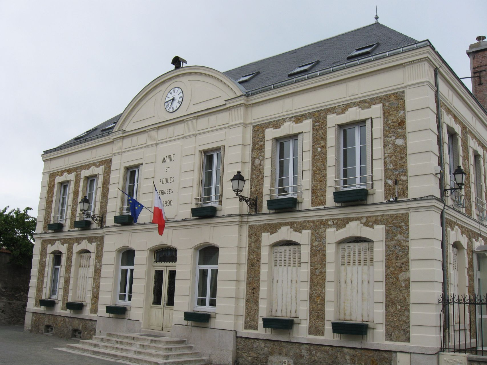 La mairie-école de Trilport (Seine-et-Marne, région Île-de-France)